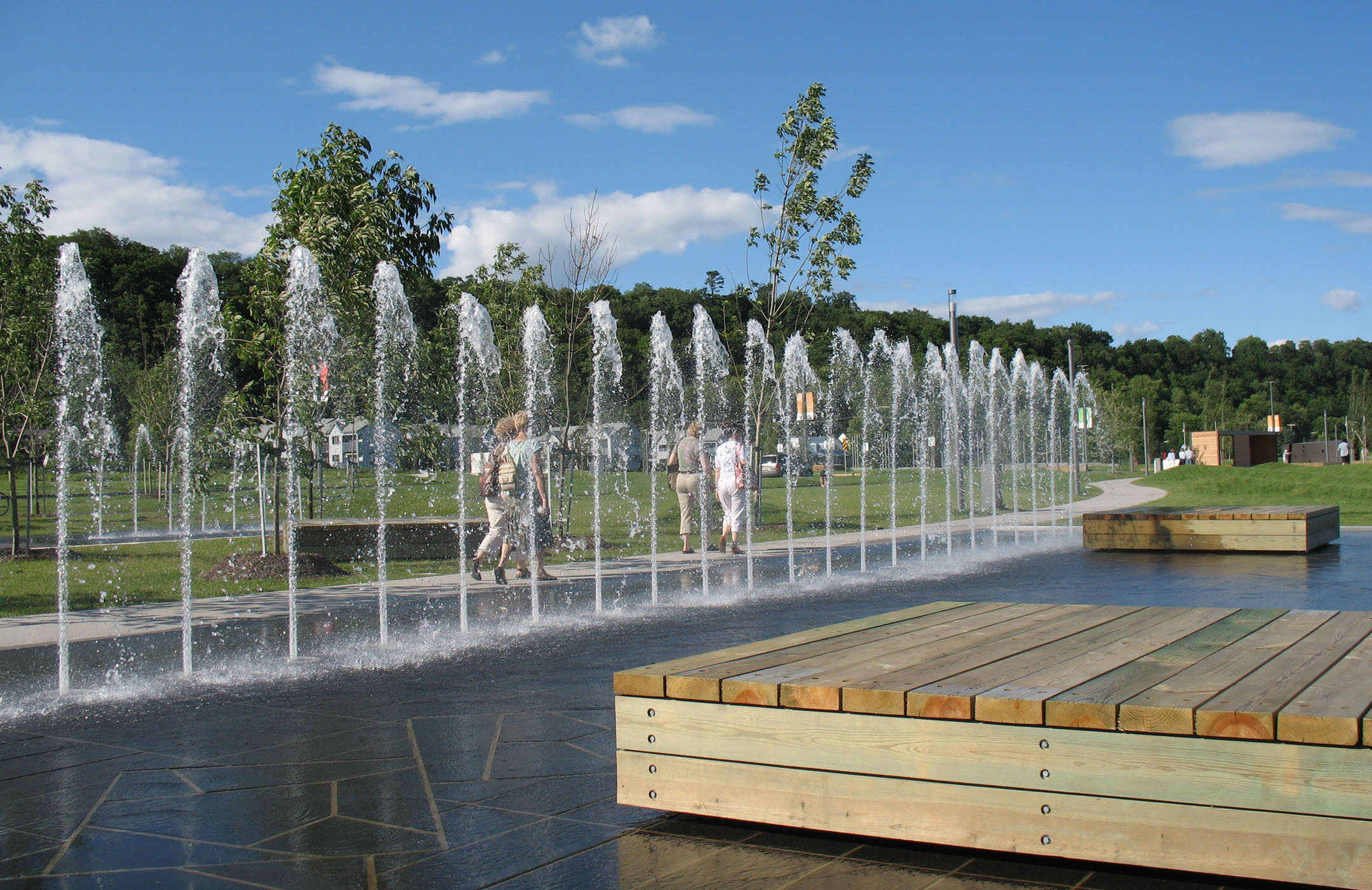 Promenade Samuel-De Champlain, Station des Quais, Quai-des-Flots, Ville de Québec, province de Québec, Canada